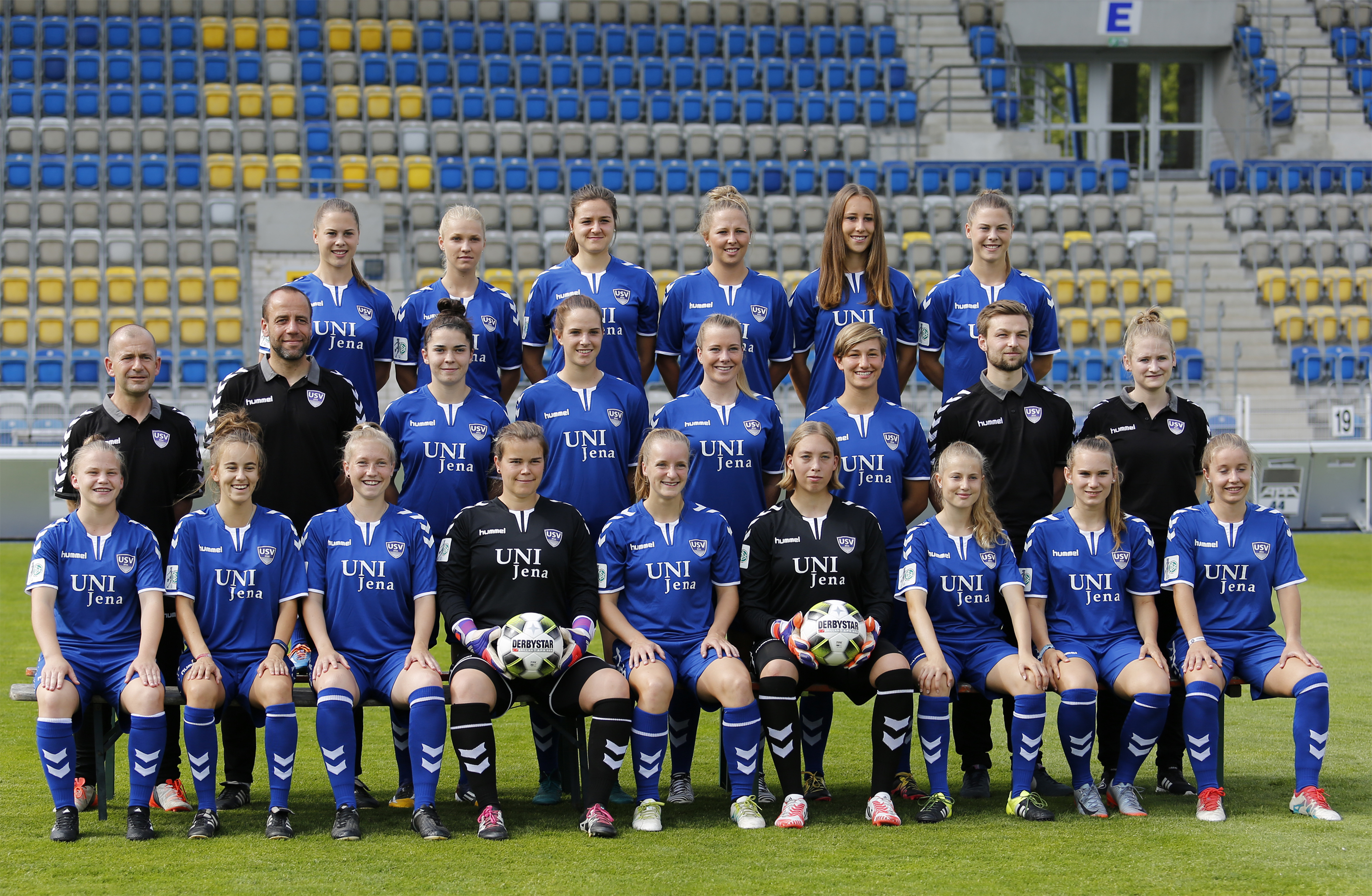 Mannschaft 2017/18